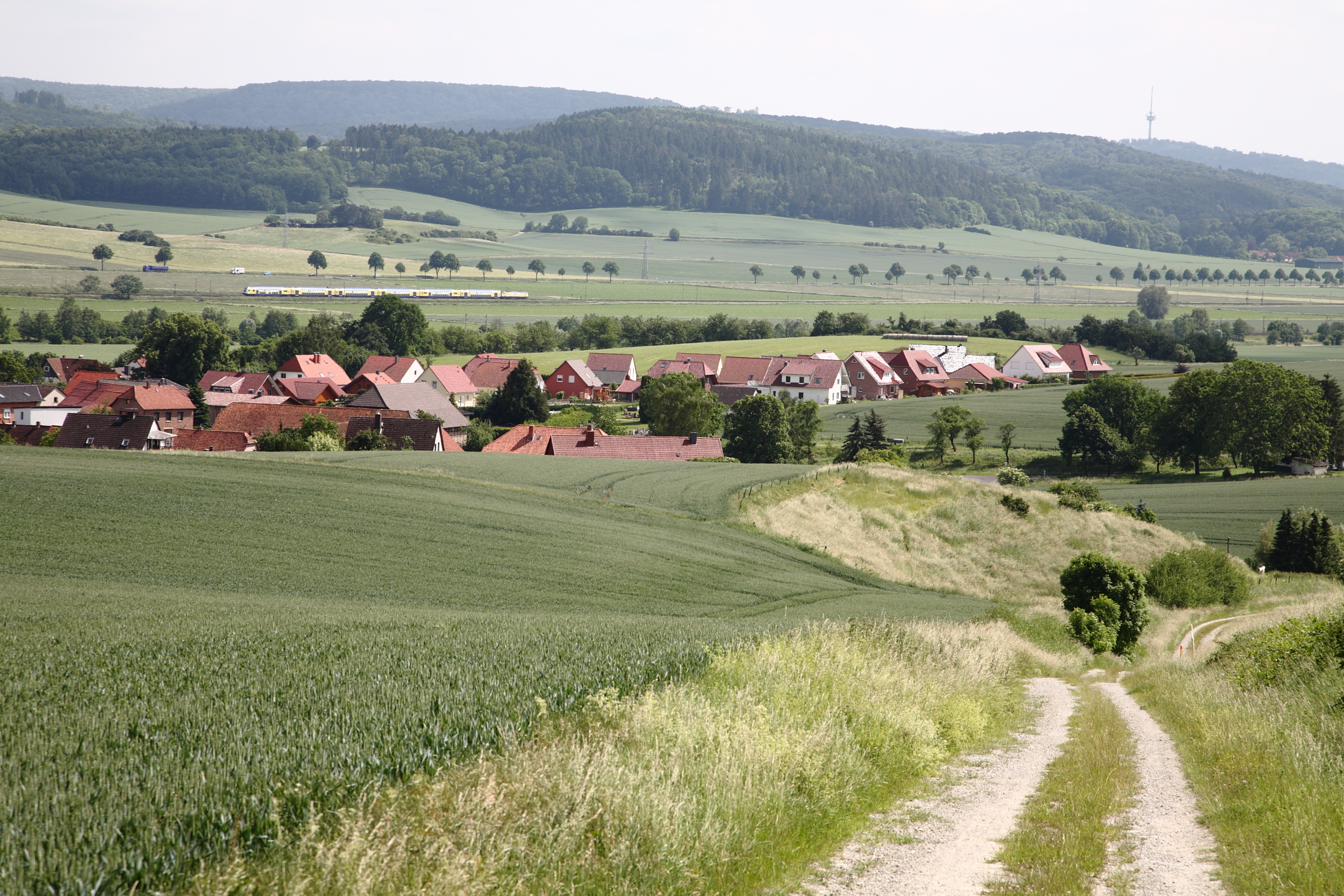 Blick vom Feldweg am Mühlenberg nach Südsüdost auf Elvese (ein Ortsteil des Fleckens Nörten-Hardenberg). Im Hintergrund das Leinetal und der Nörtener Wald (überwiegend im Landschaftsschutzgebiet „Westerhöfer Bergland-Langfast“), rechts der Fernmeldeturm Göttingen (155 Meter hoher Turm am Steinberg).